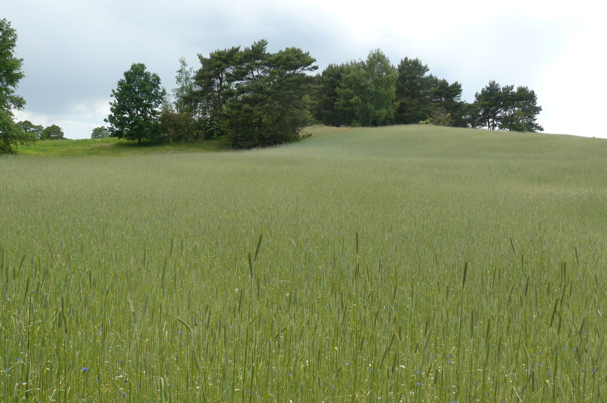 Poznań, Sypniewo, dolina Kopli i Głuszynki.